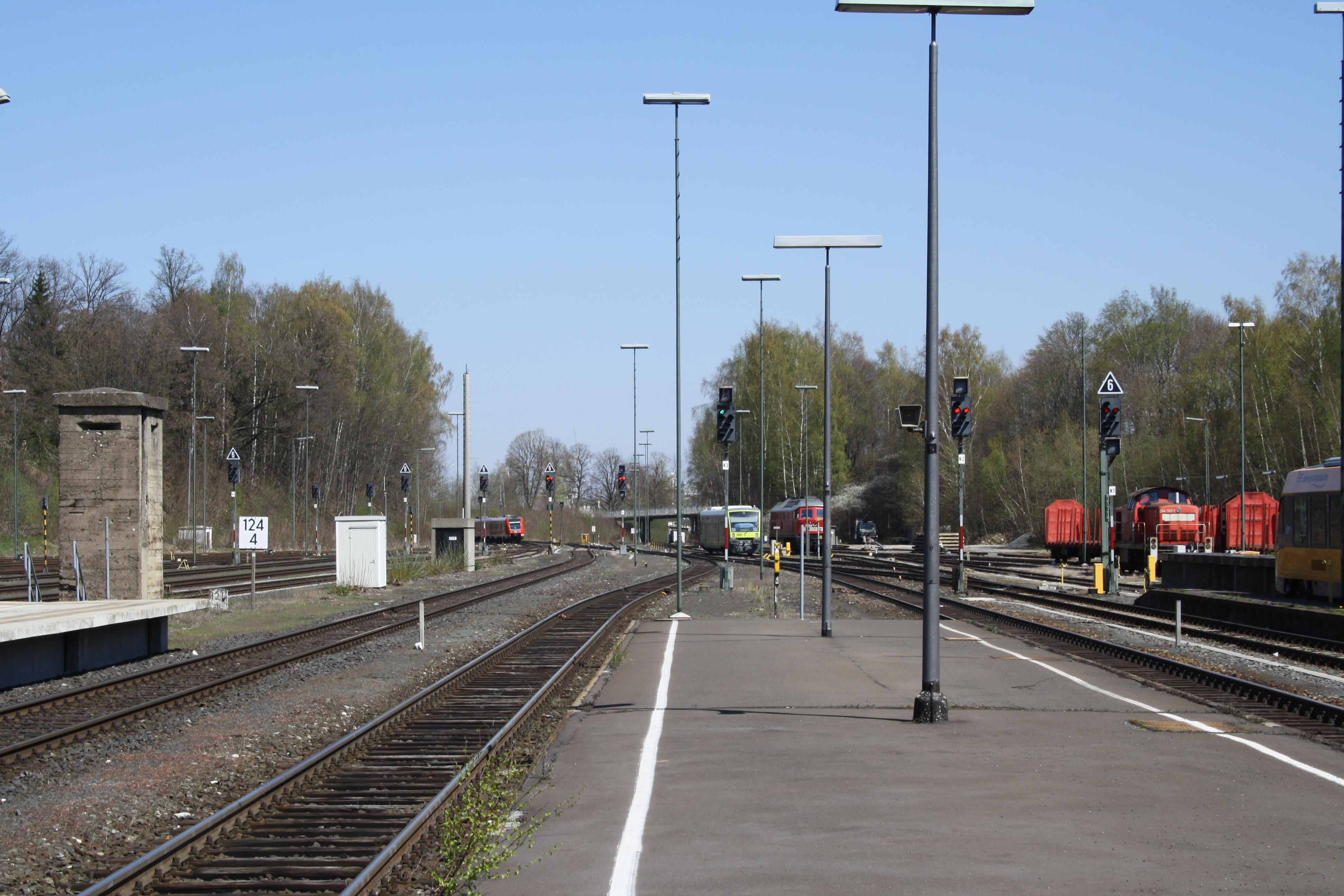 Nordkopf des Bahnhofs Marktredwitz